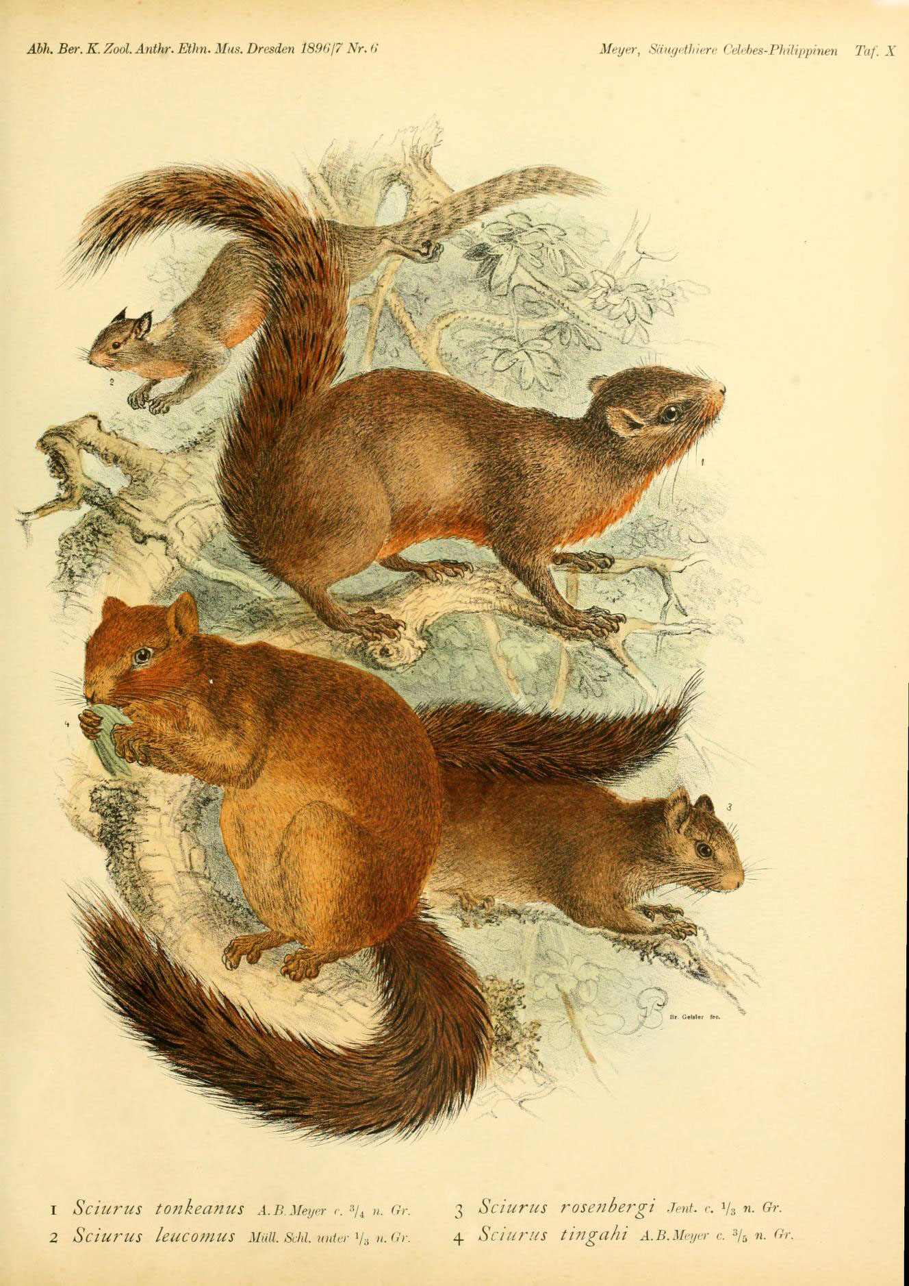 Äbh. Ber. K. Zool. Antkr. Ethn. Mas. Dresden 189(117 Nr. H Meyer, Säiigdh'ierc Cdt-bes-Philipphien Tu f. X 1 Sciurus tonkeanus A.B. Meyer r. -Vi ;/. Gr. 3 Sciurus rosenbergi Jent. c 1/3 «• Gr- 2 Sciurus /eucomus Mall. Sdü. uulcr y,, n.(,'r. 4 Sciurus tingahi A. B. Meyer c. '^jr, n. Ch